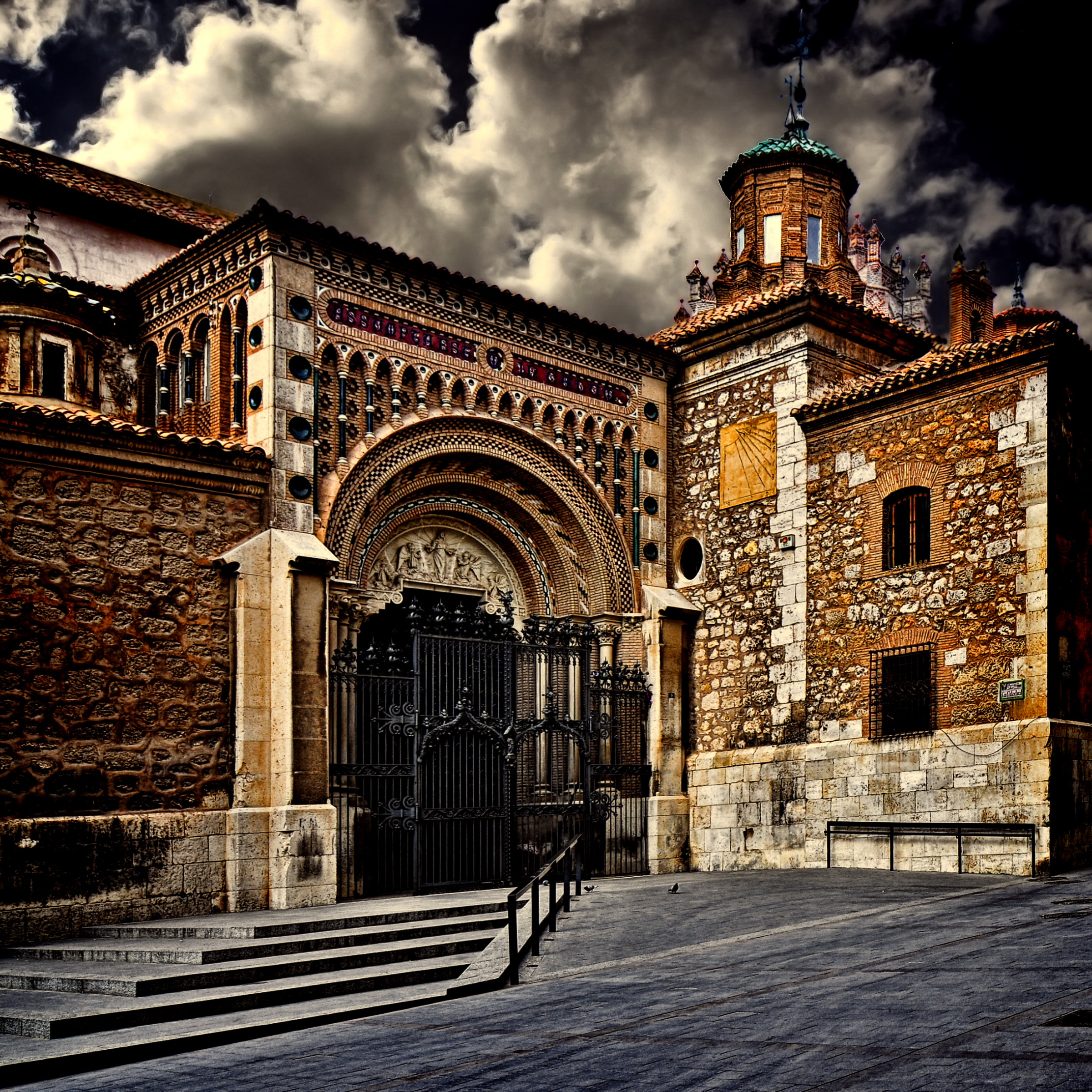 Catedral de Santa María de Teruel (Teruel).